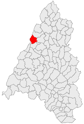 Categorie:Hărţi ale judeţului Bihor